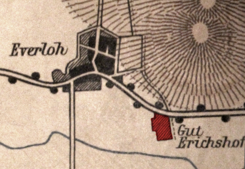 Rittergut Erichshof Schulwandkarte, Gutsgelände nachträglich eingefärbt